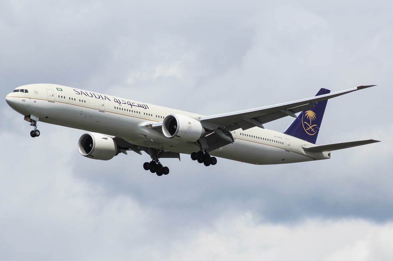 HZ-AK40 Boeing 777 Saudia